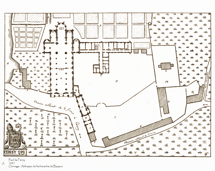 Plan de l'abbaye de Cerisy-la-Forêt (Par Paul de Farcy - 1888)